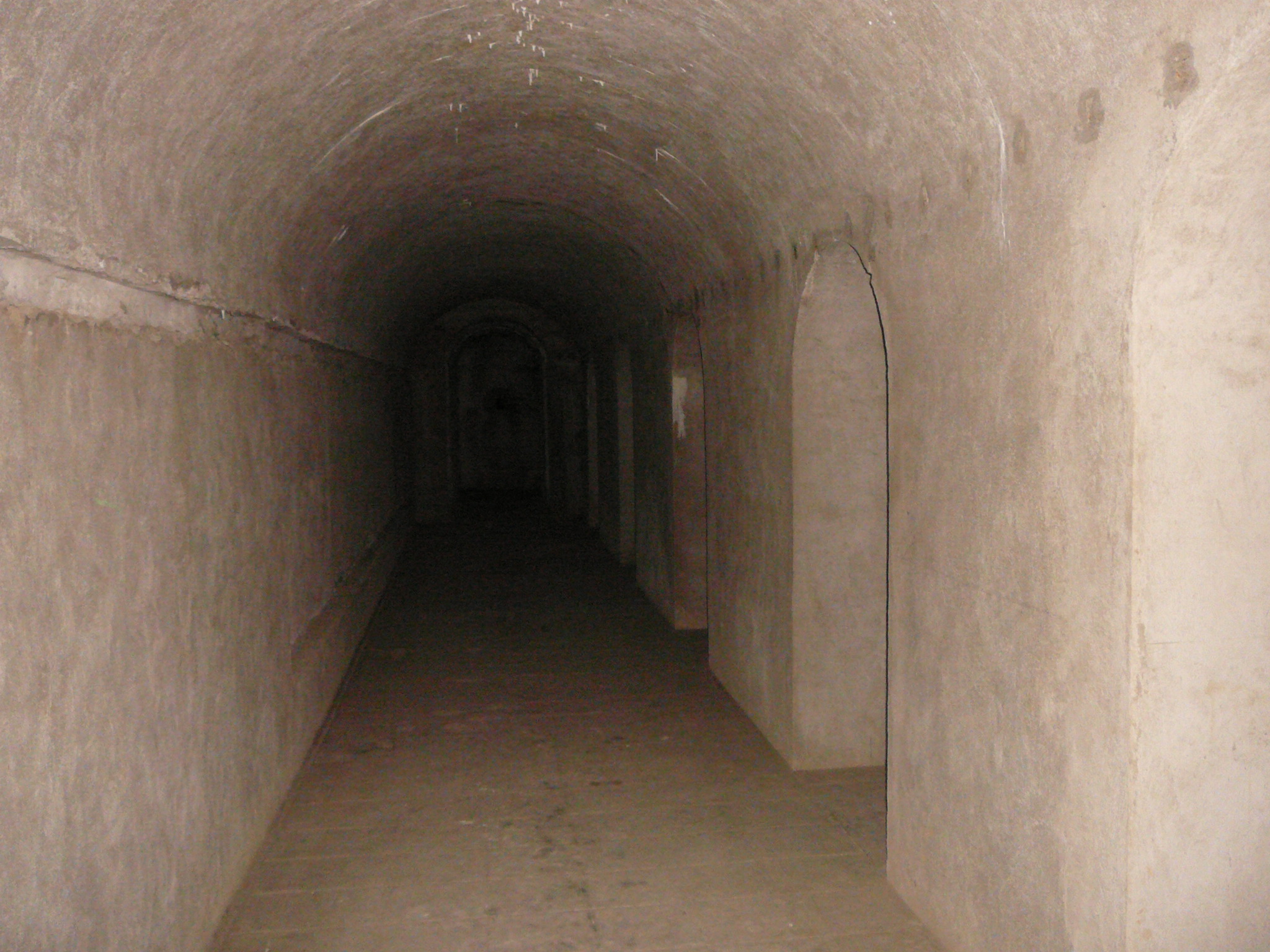 opera 36, sciaves